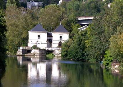 Moulin de Celle, sur le Clain à Poitiers